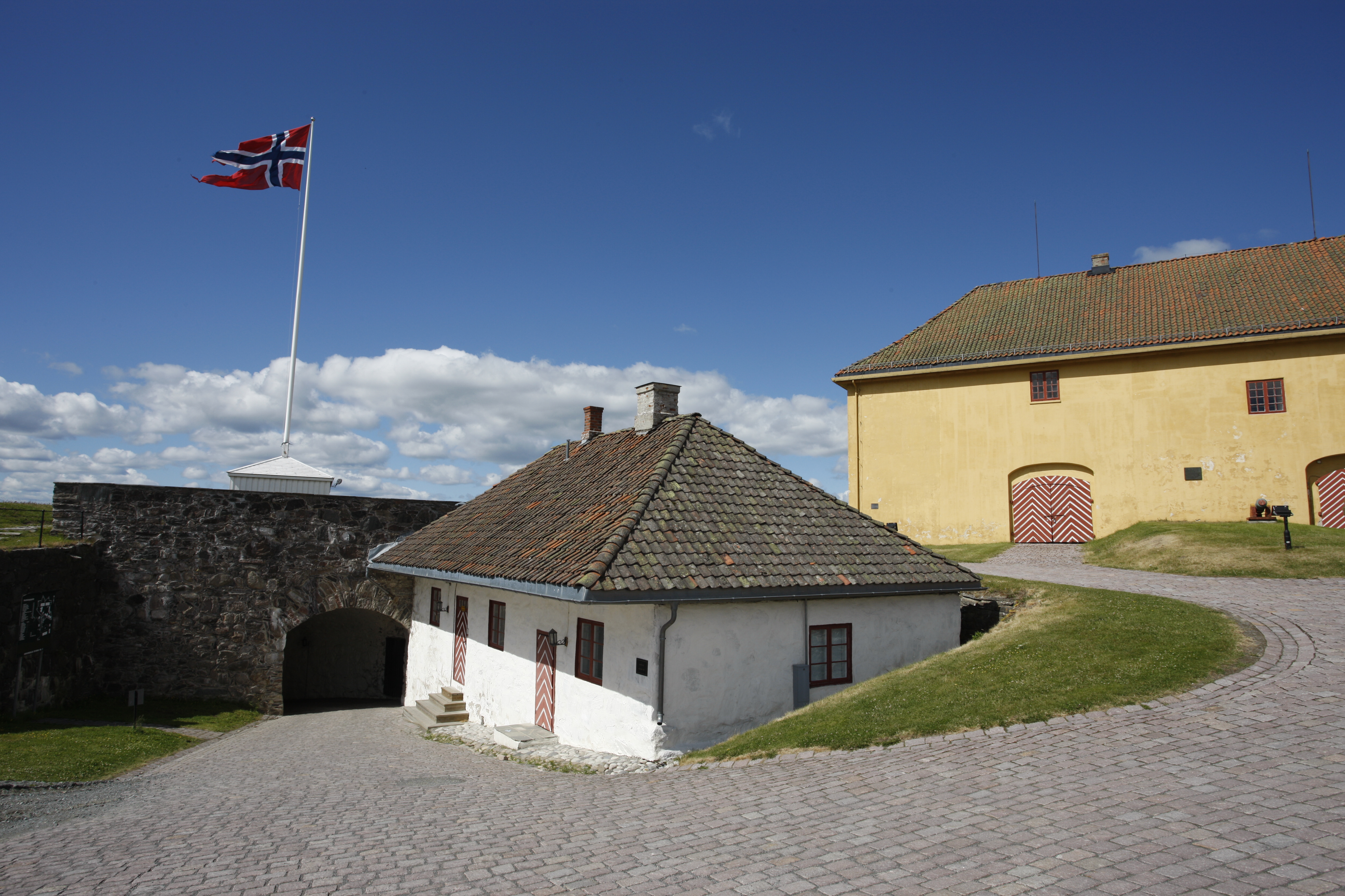 Flagget er heiset til topps på Kongsvinger festning.